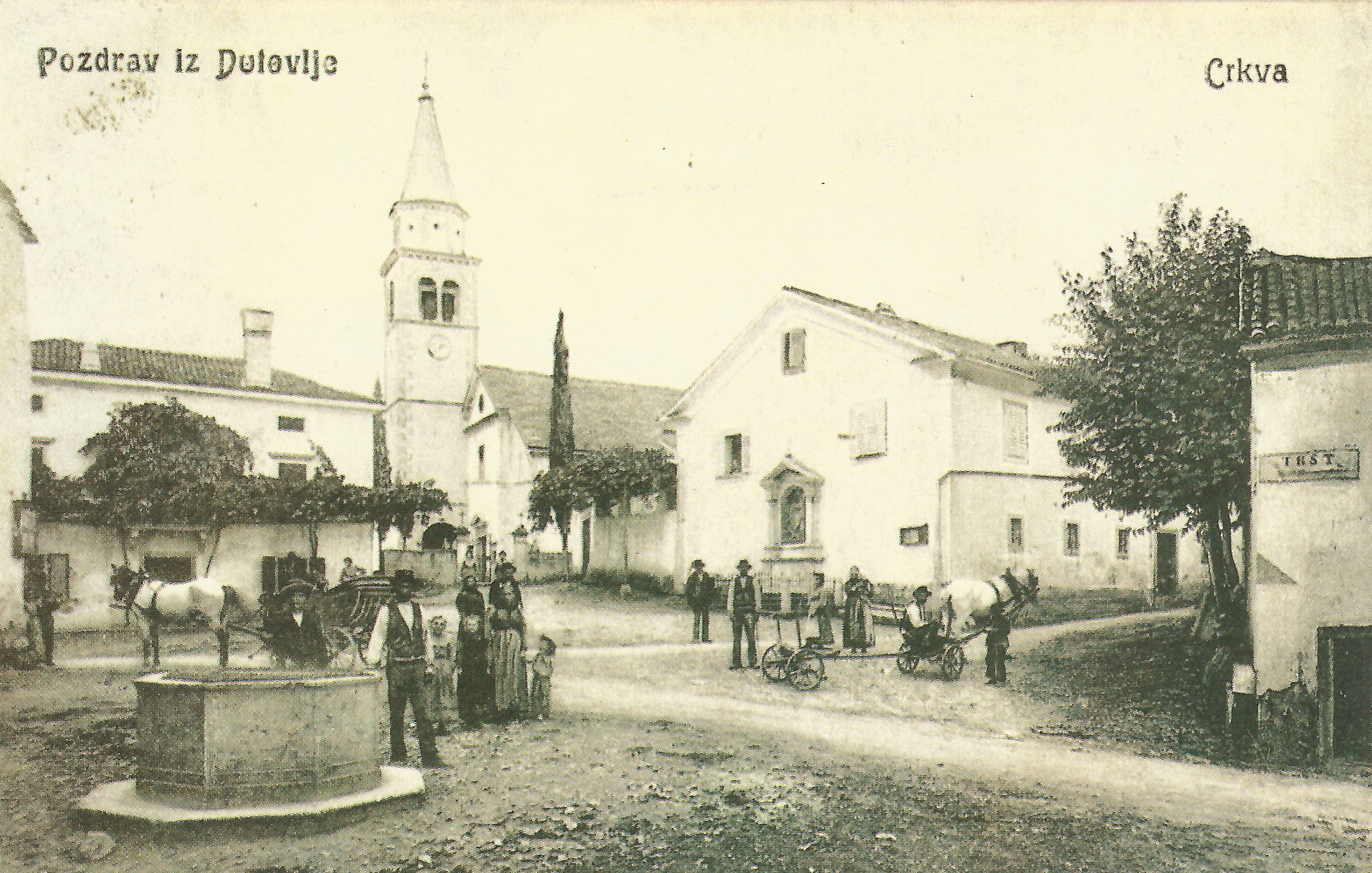 Razglednica Dutovelj.